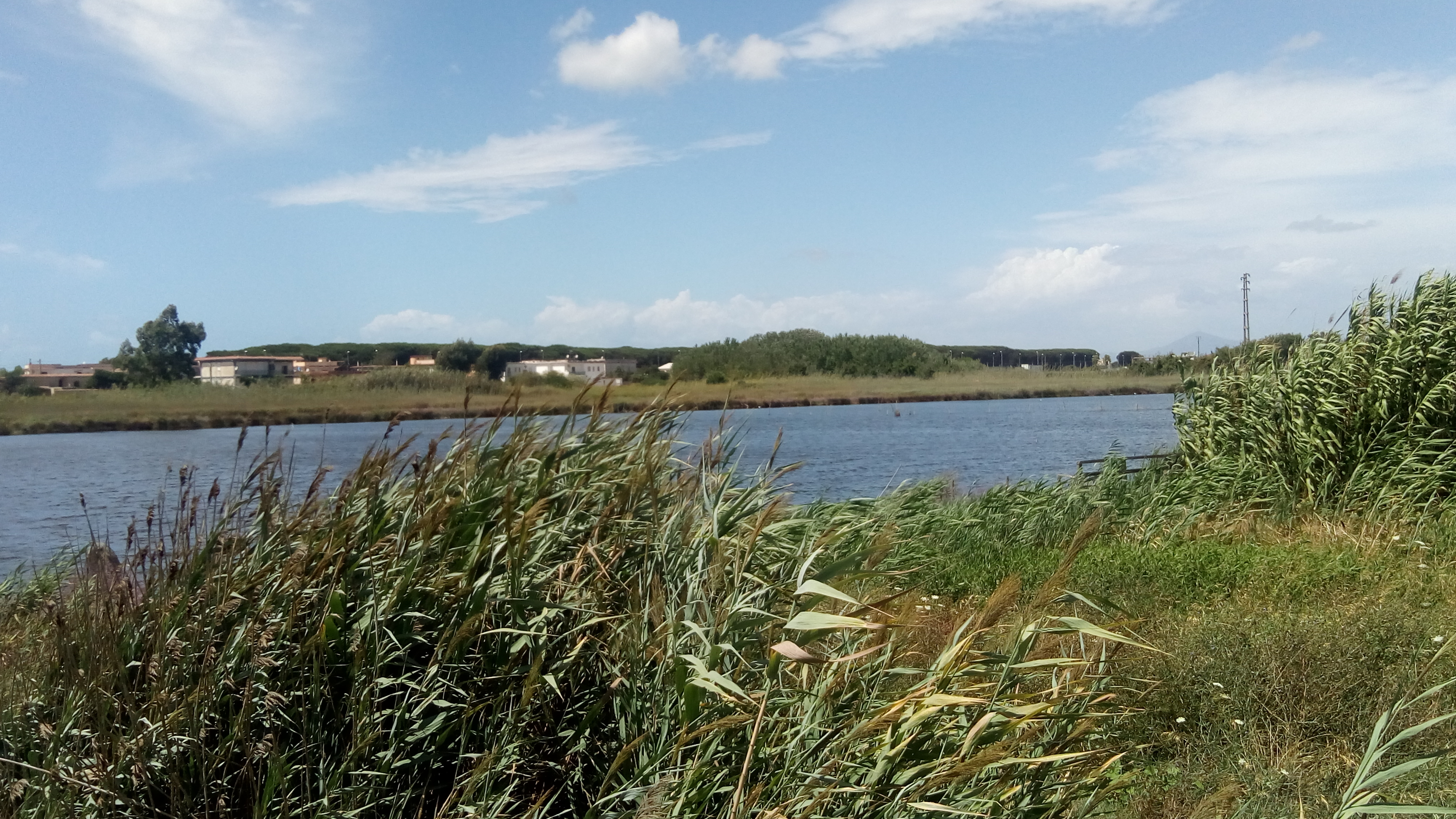 Parco archeologico dei Campi Flegrei - Parco archeologico di Liternum This is a photo of a monument which is part of cultural heritage of Italy.